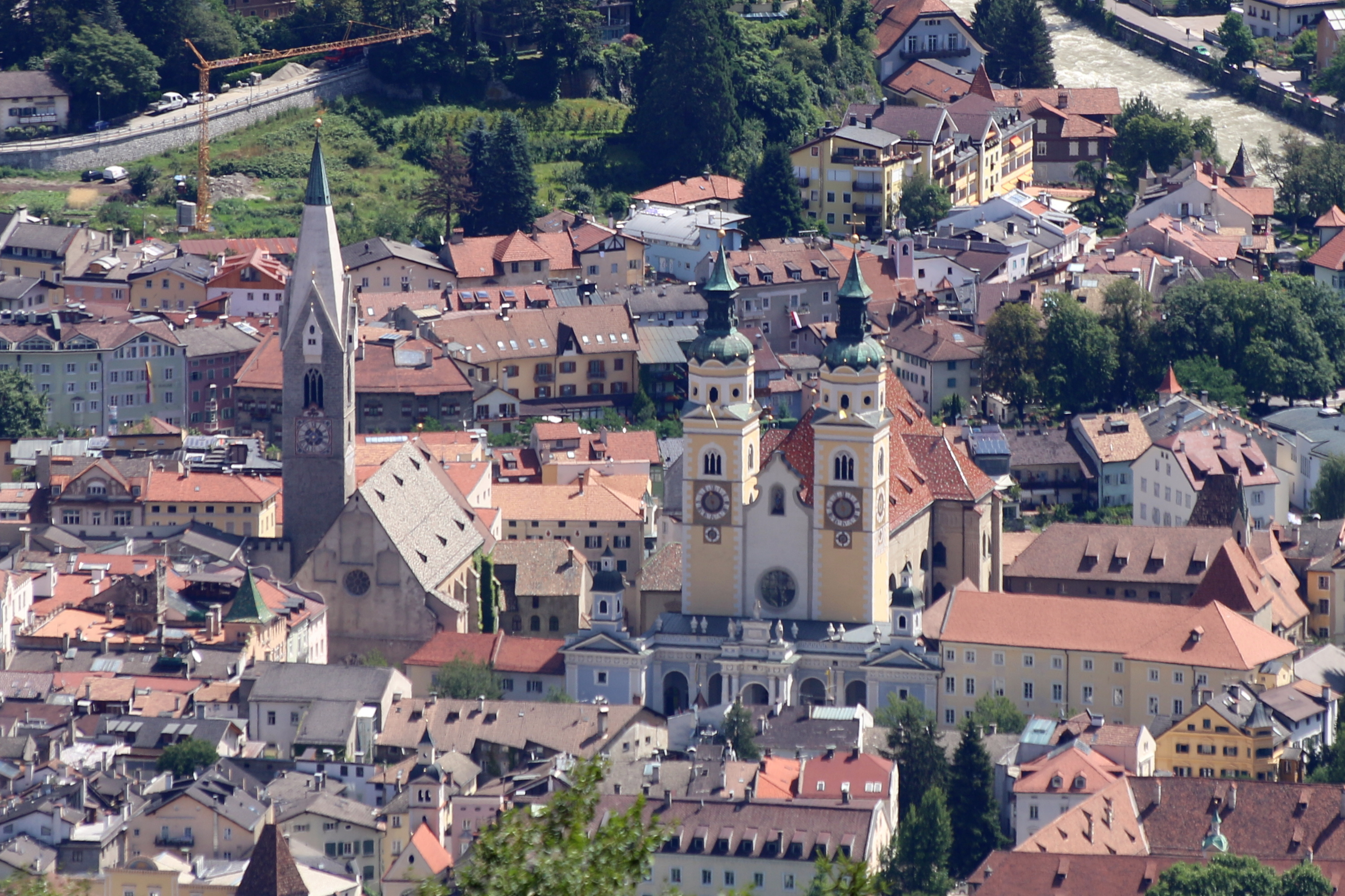 Dombezirk in der Innenstadt von Brixen